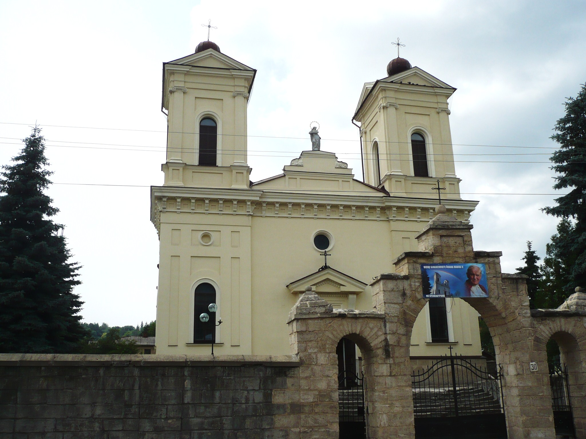 Kościół pw. św. Stanisława w Krzemieńcu